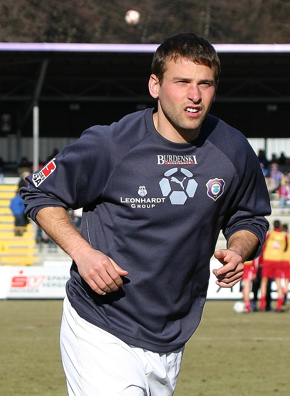 Tomáš Klinka FC Erzgebirge Aue 2006